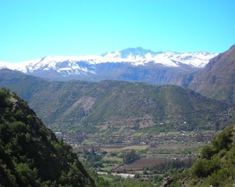 Vista a El Toyo, San José de Maipo, Chile